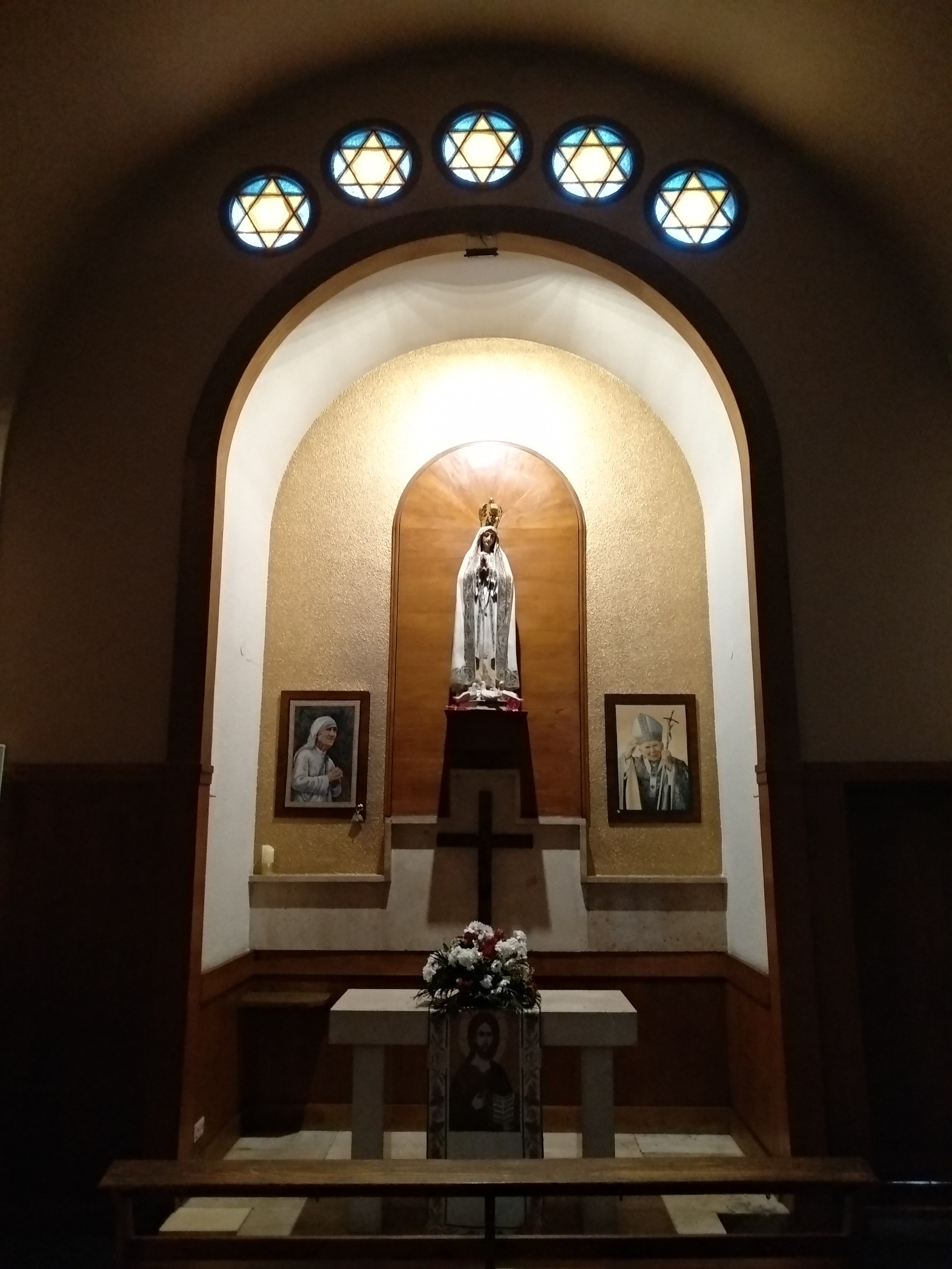 Iglesia de San Francisco Javier (Pamplona)